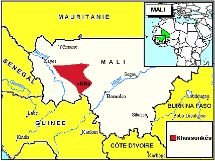 Aire d'extension des Khassonkés.